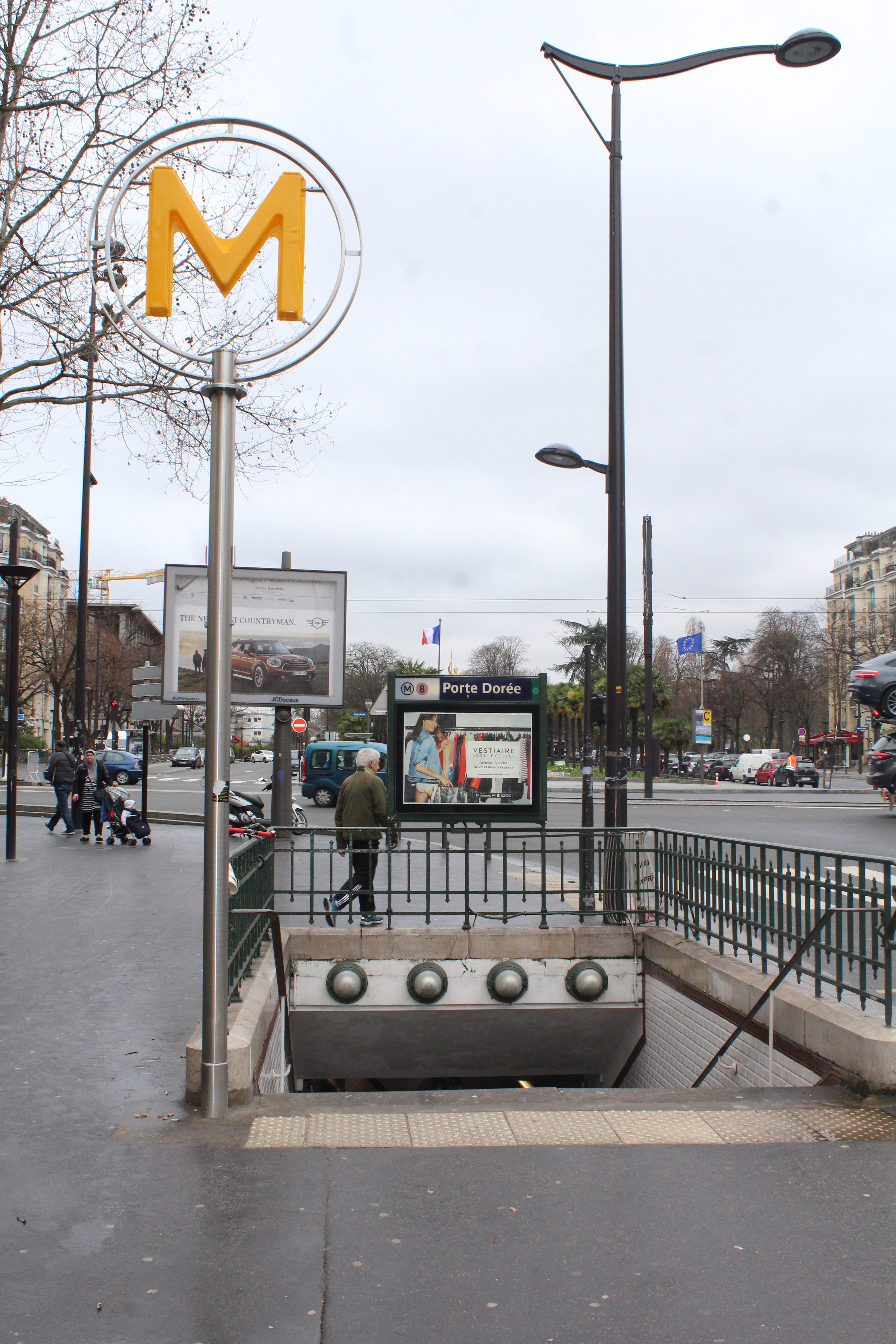 Entrée de la station de métro Porte Dorée à Paris.